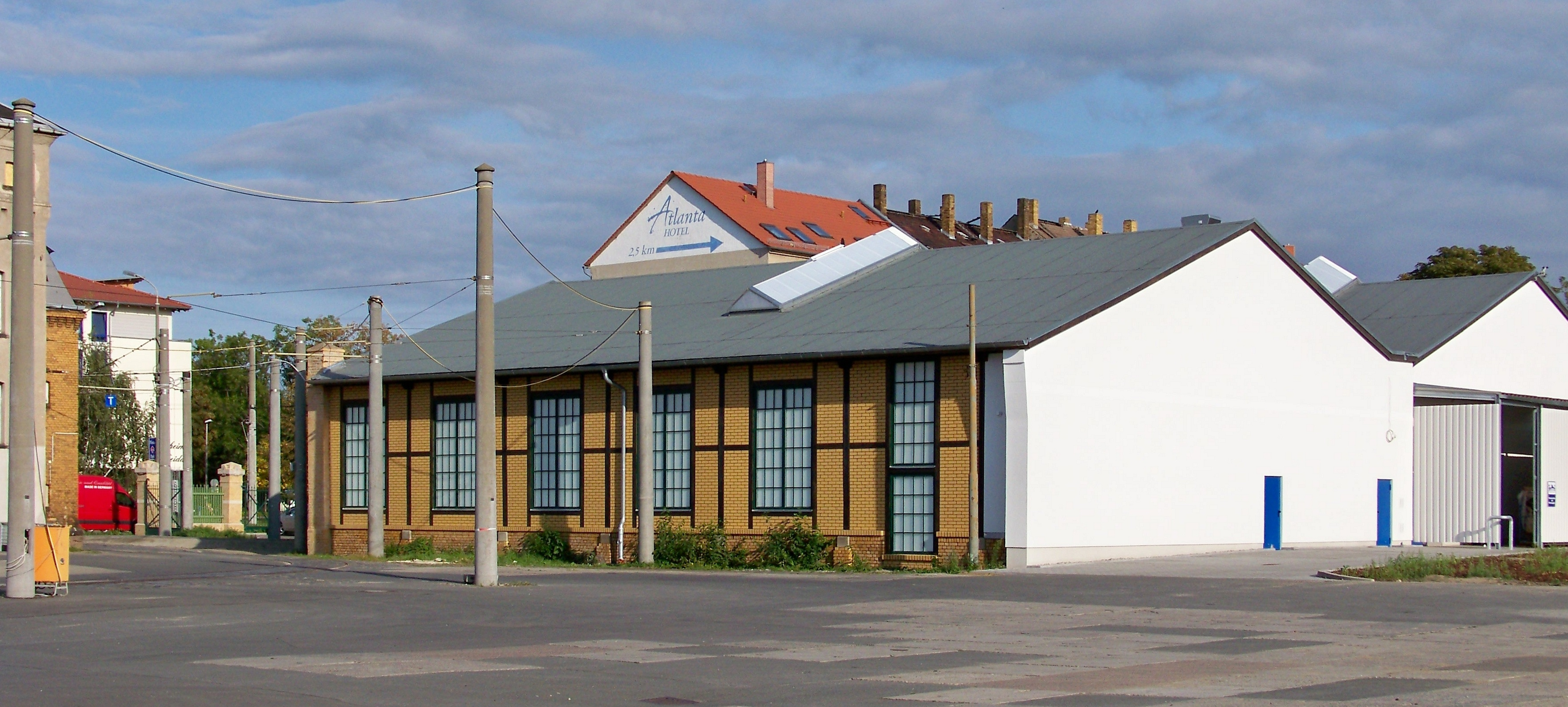 Ehemaliger Straßenbahnhof in Leipzig-Probstheida, links als Rest der Anlage die Wendeschleife Probstheida, die 2010 im Zuge der Straßensanierung Prager Straße aufgegeben wurde